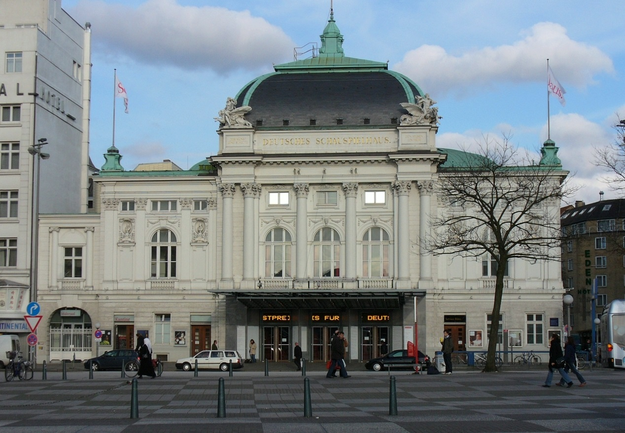 DEUTSCHES SCHAUSPIELHAUS